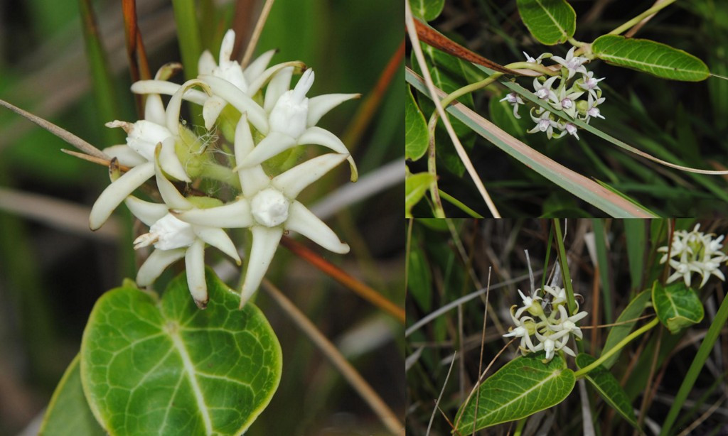 Oxypetalum macrolepis. Apocynaceae. Fotos tomadas en bañados ácidos al margen del Río de la Plata en el departamento de Canelones, Uruguay.